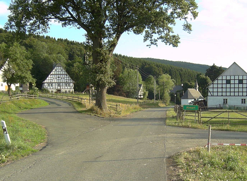 Almert (Schmallenberg), Germany.